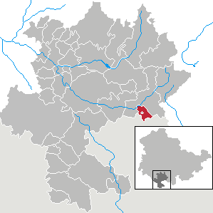 Bockstadt in Thuringia - district Hildburghausen